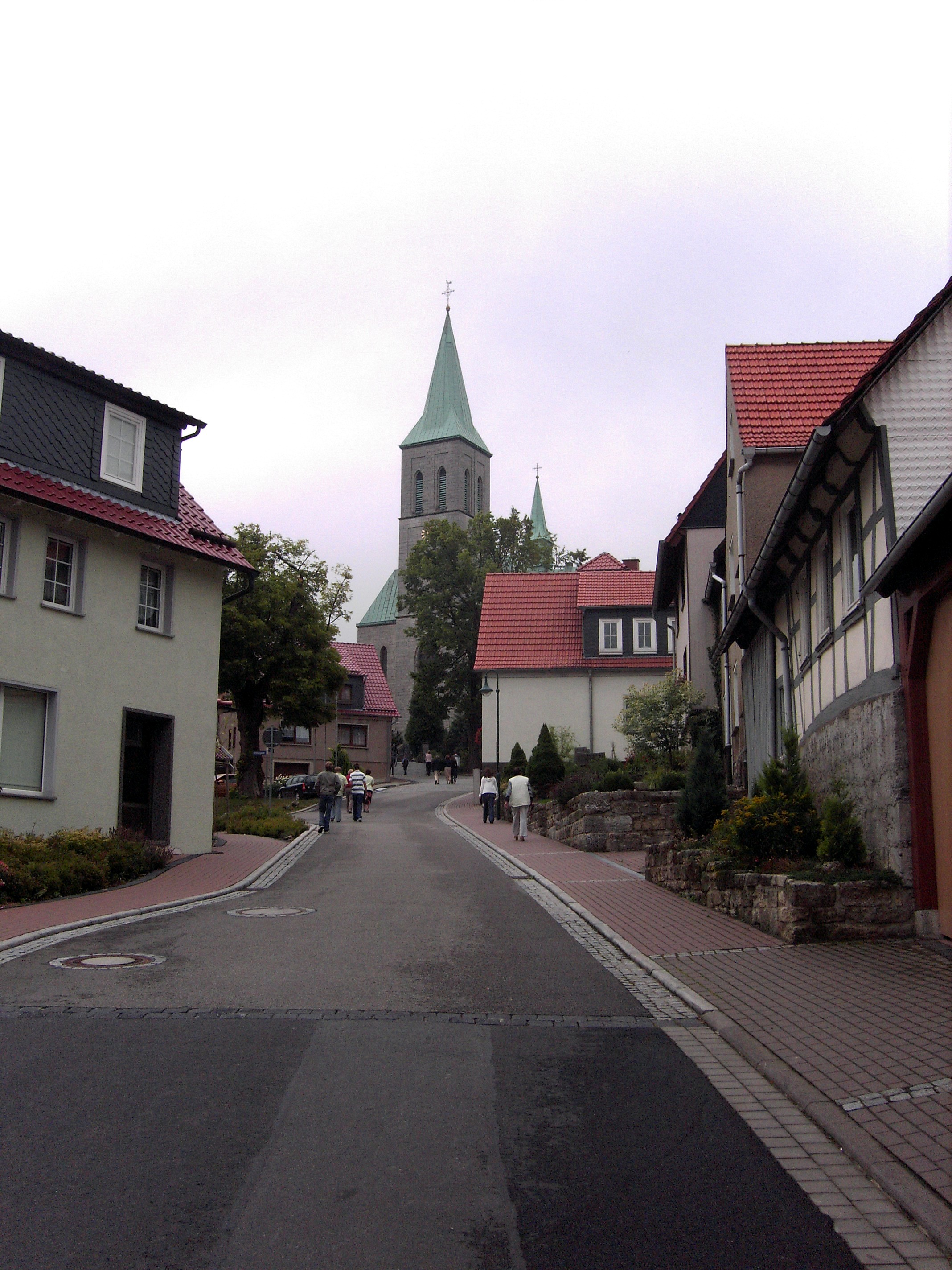 Eichsfelder Dom, Katholische Kirche St. Alban in Effelder, Eichsfeld, Thüringen, Deutschland